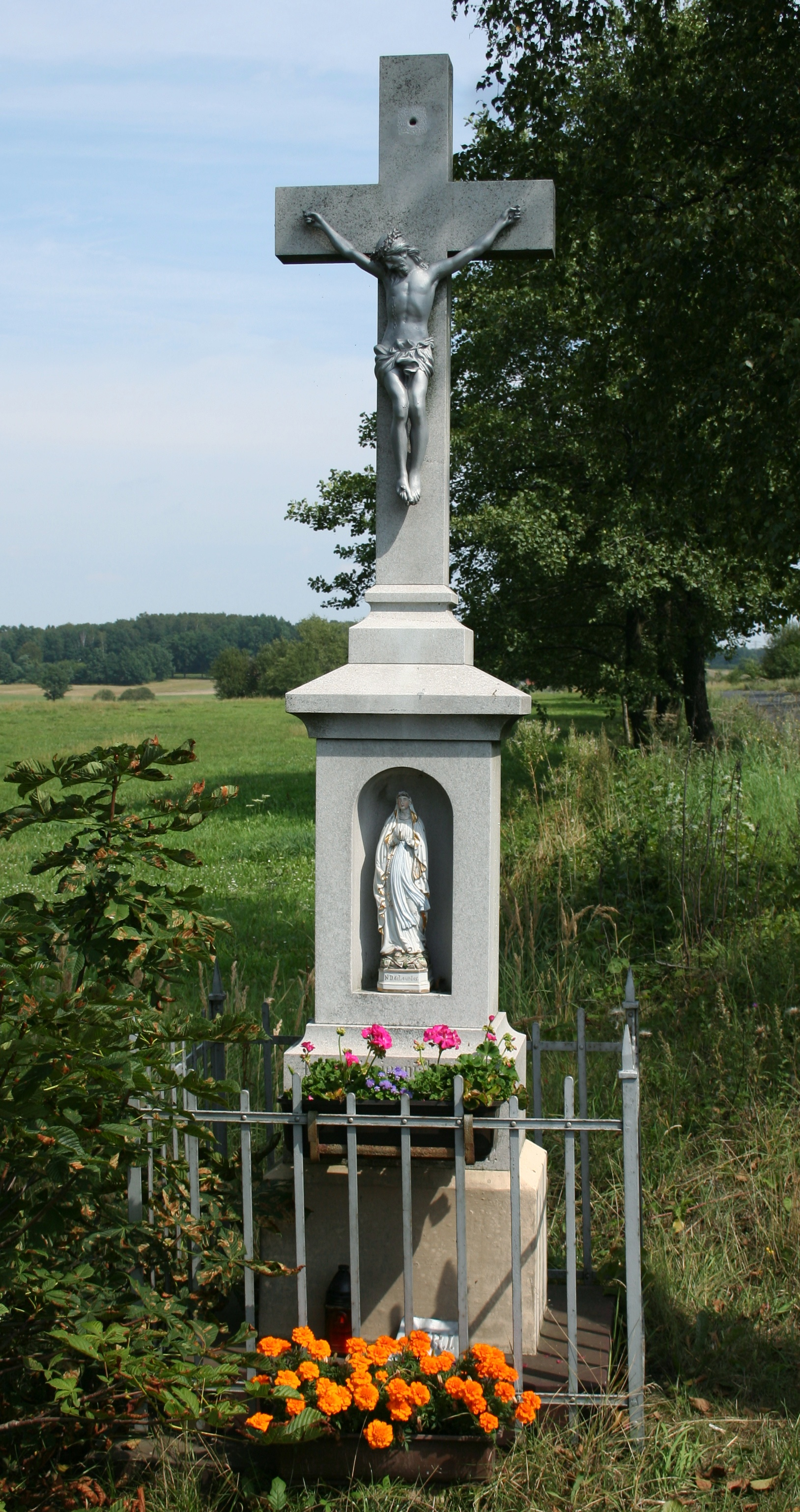 kapliczka w Skrzeszówce, Ligota Woźnicka, powiat lubliniecki